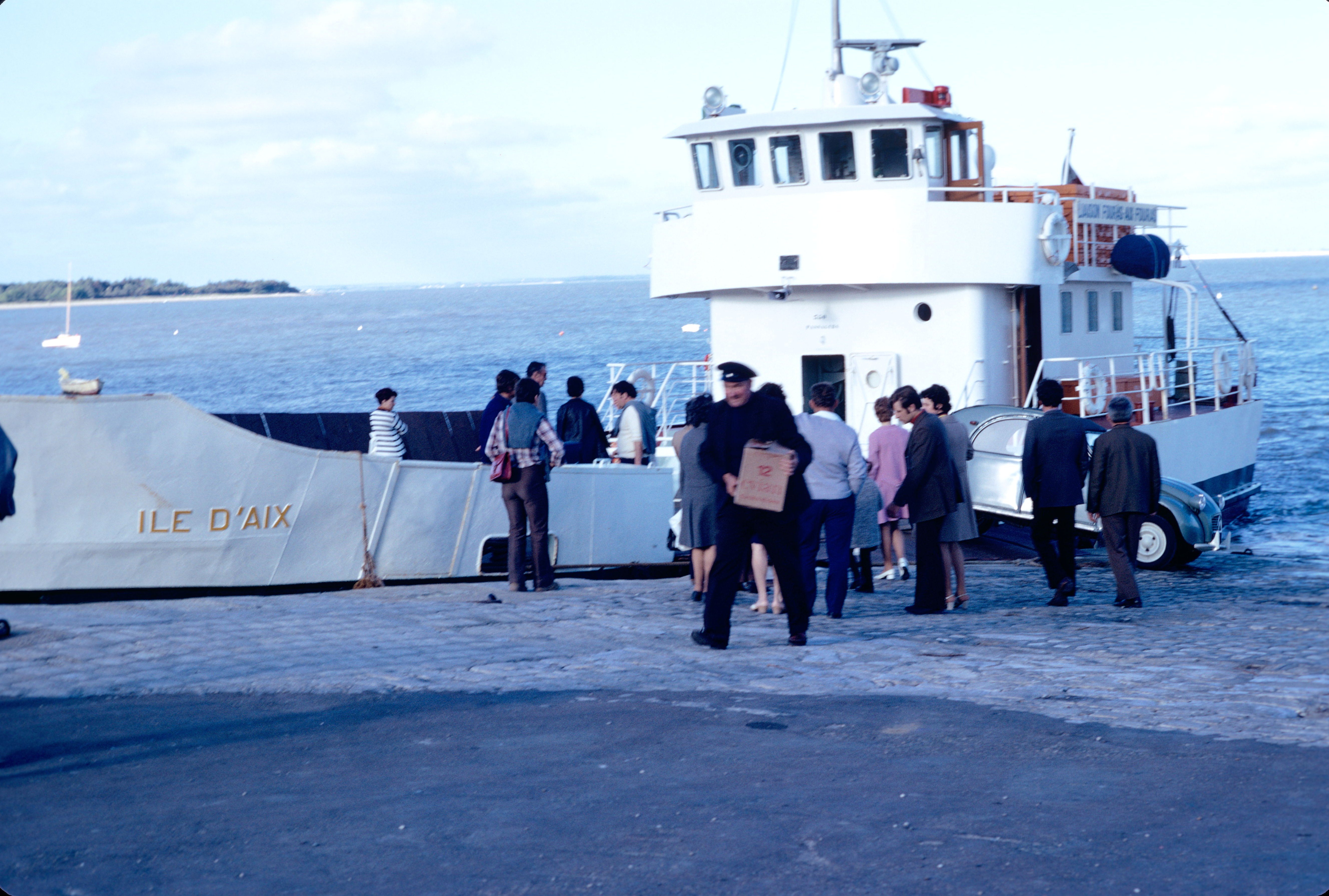 Le bac "Île d' Aix" effectuant la liaison maritime entre la Pointe de La Fumée (Fouras) et l' Île d' Aix est accosté au Quai de l'Acadie à l' île d'Aix. Derrière les piétons on peut voir une Citroën 2CV , voiture populaire française des années 1950 à 1970, débarquer du bateau. Ce bac, construit à La Pallice et mis en service en 1966, était désarmé dans le bassin de commerce du port de Rochefort depuis Février 2011. Il a été démoli à La Cotinière en Mai 2014 (Ile d'Oléron)